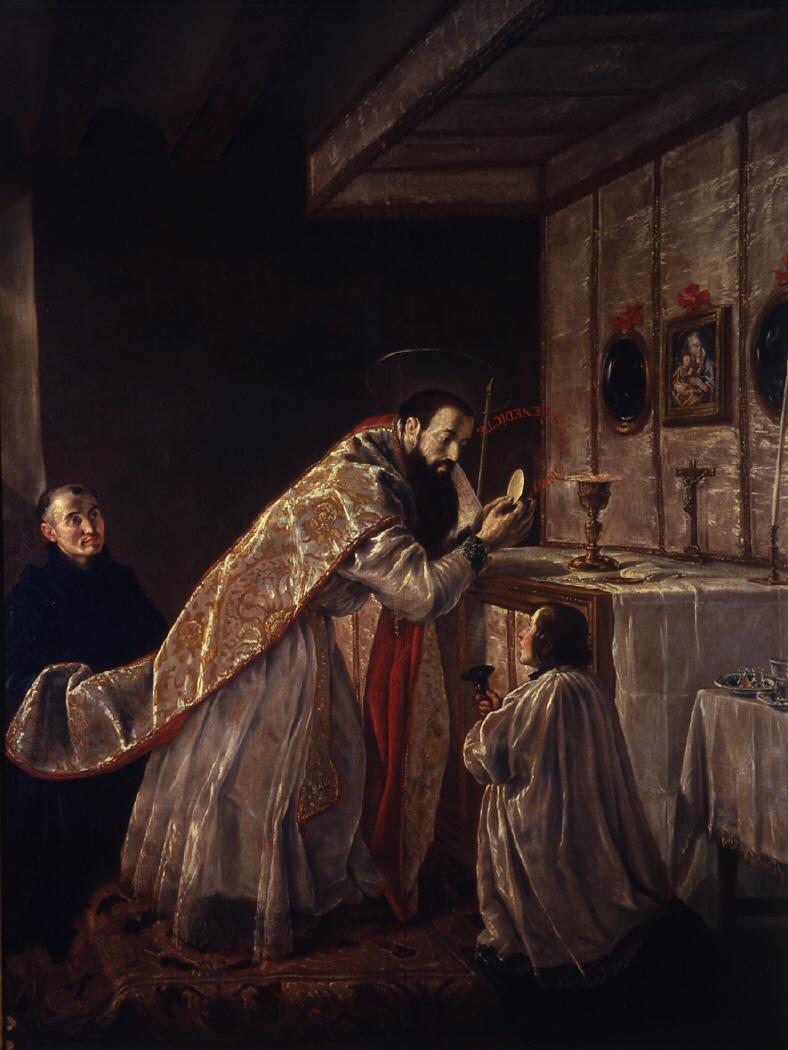 La obra representa a San Benito de Nursia, fundador de la Orden de los benedictinos, celebrando la Sagrada Eucaristía.